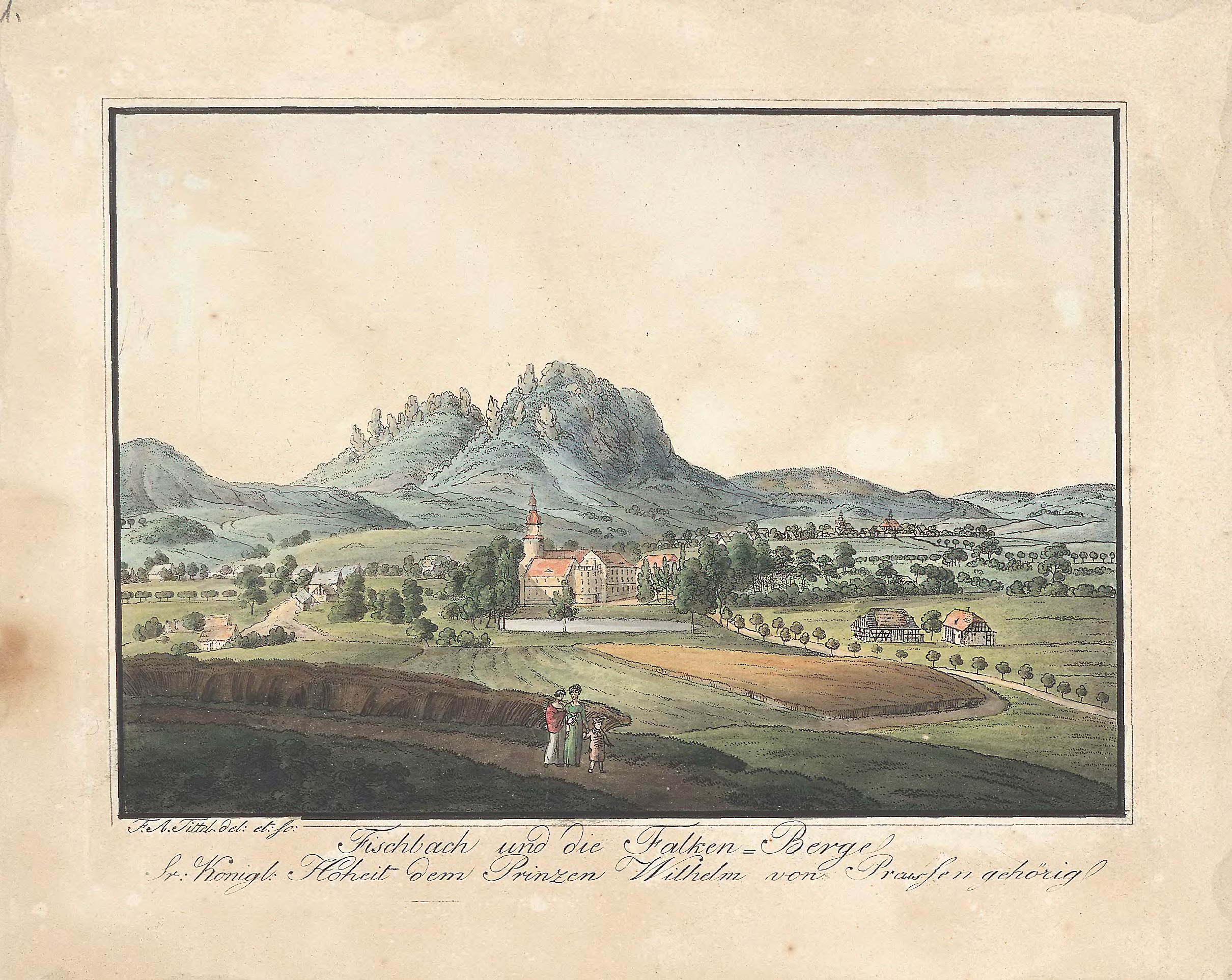 Fischbach und die Falken-Berge, Sr. Königl. Hoheit dem Prinzen Wilhelm von Preussen gehörig